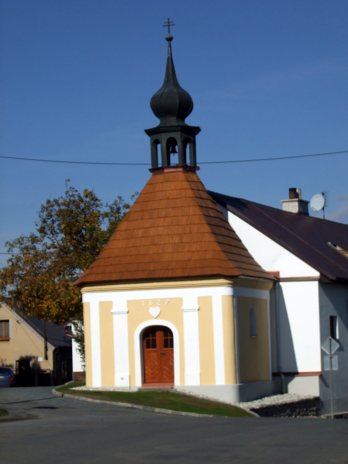 Koutská kaplička